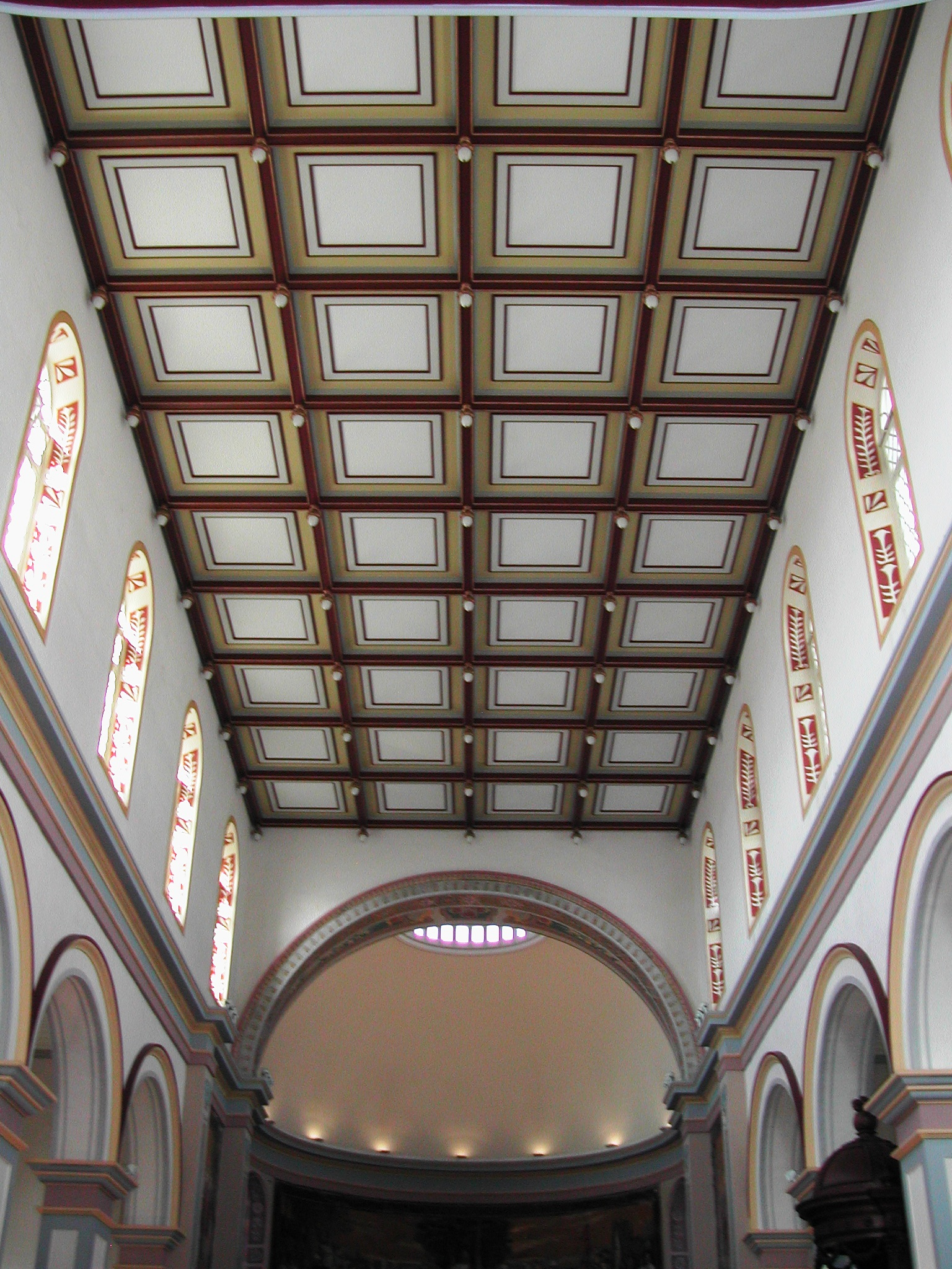 Intérieur de la cathédrale de Saint-Denis.